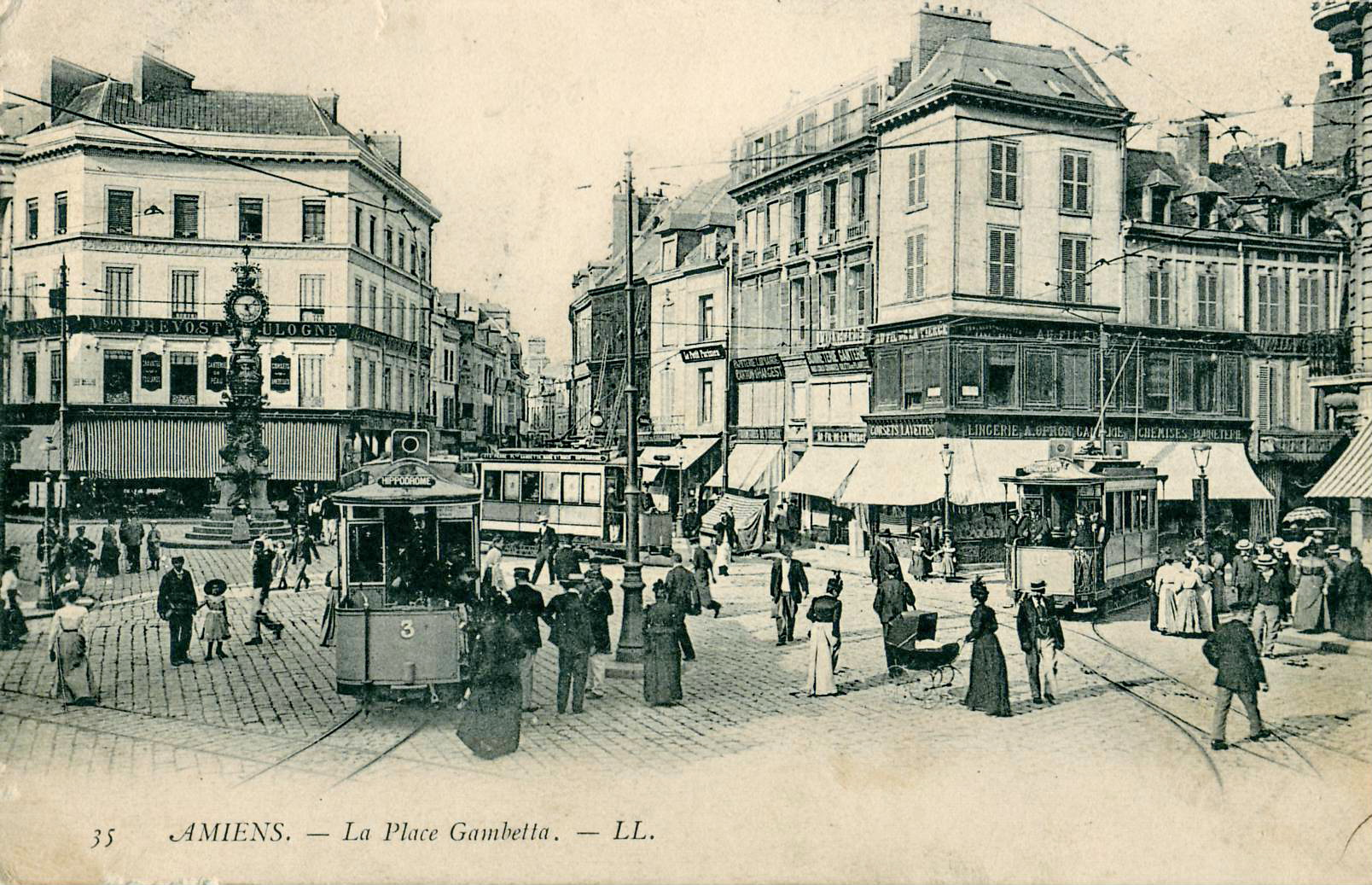 Carte postale ancienne éditée par LL, N°35AMIENS : La Place GambettaOn voit 3 tramways de l'ancien réseau d'Amiens